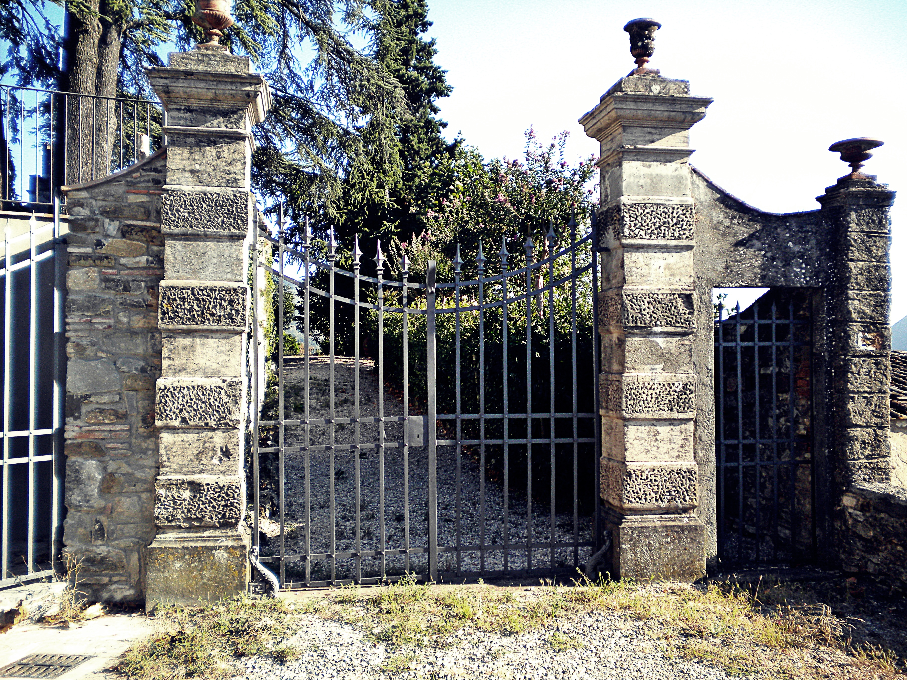 Gate to Villa del Bello in Tuscany.